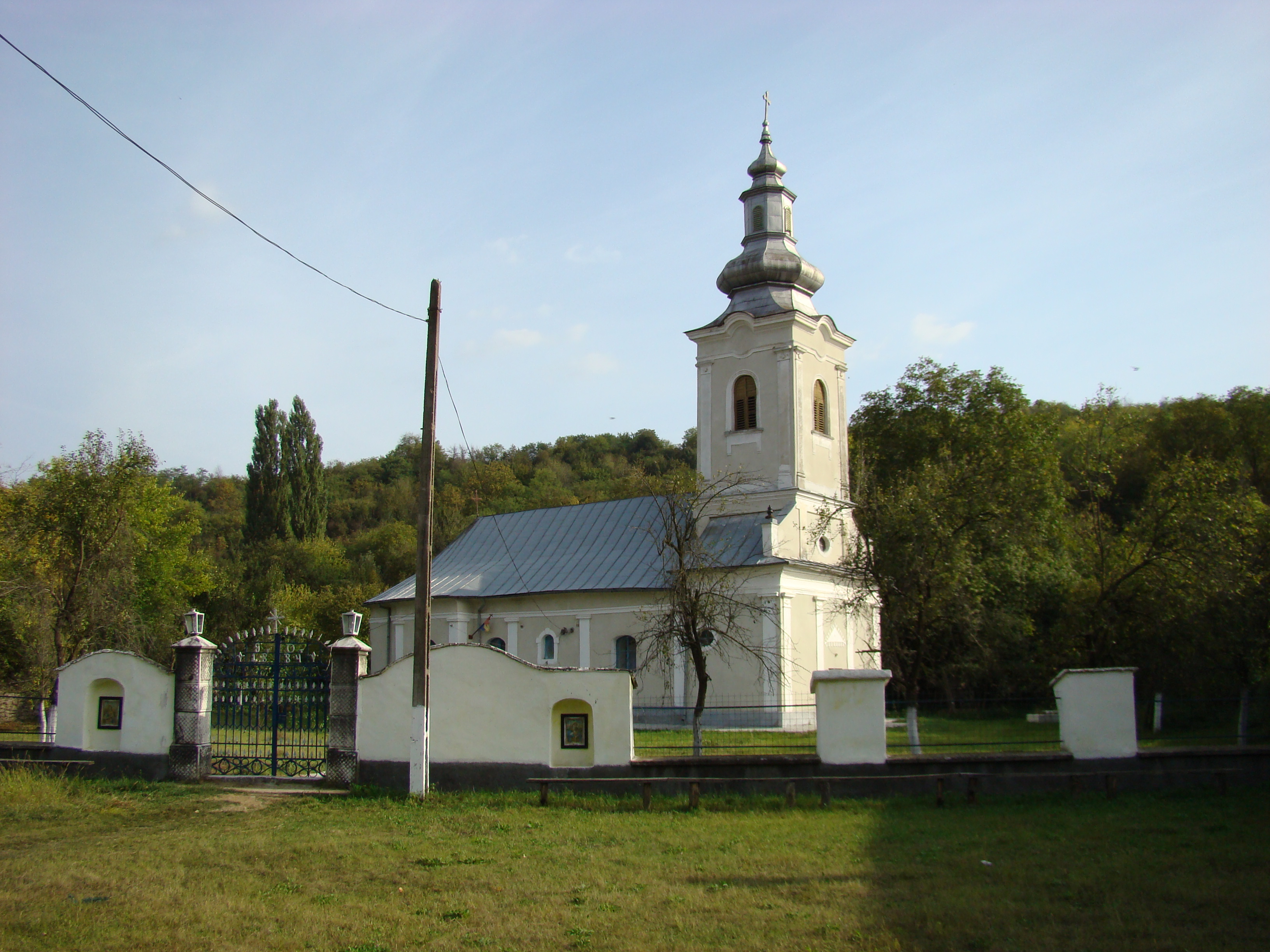 Biserica monument „Sf.Arhangheli” din Secășeni, Caraș-Severin